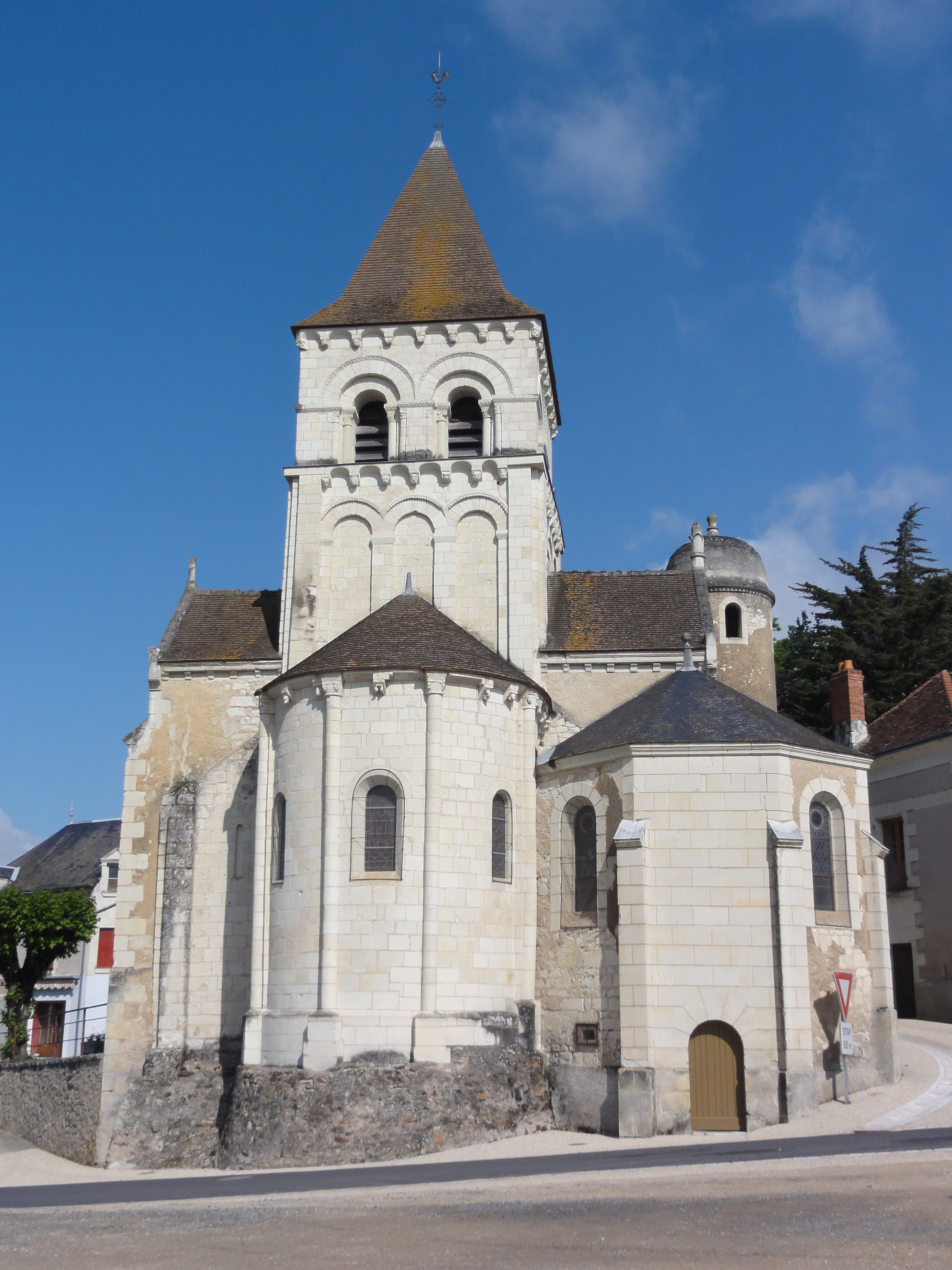 Vaux-sur-Vienne (Vienne) Église Notre Dame This building is indexed in the Base Mérimée, a database of architectural heritage maintained by the French Ministry of Culture, under the references IA00046332 and classé .